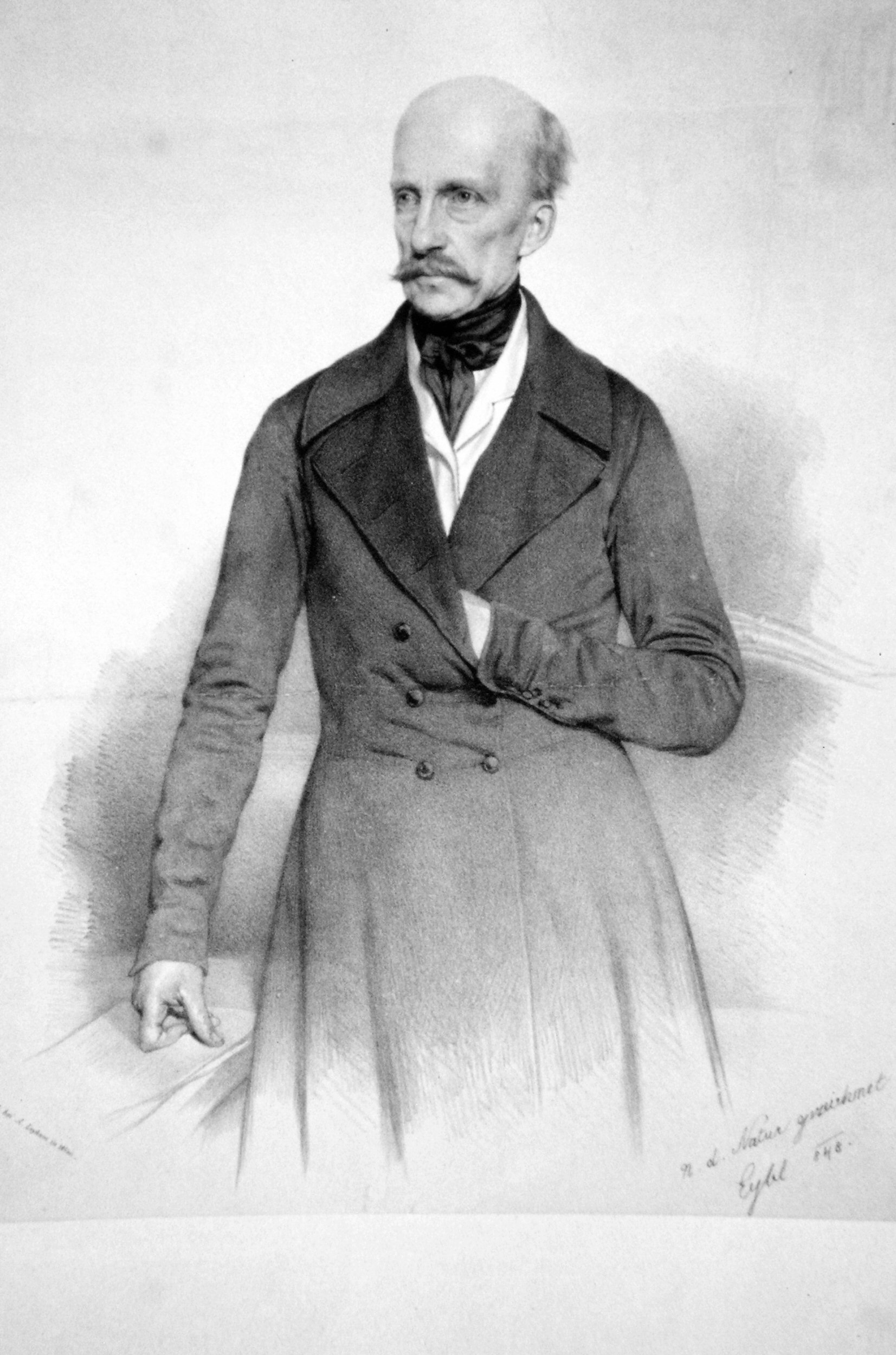 Johann von Österreich (1782-1859), Erzherzog, Reichsverweser.